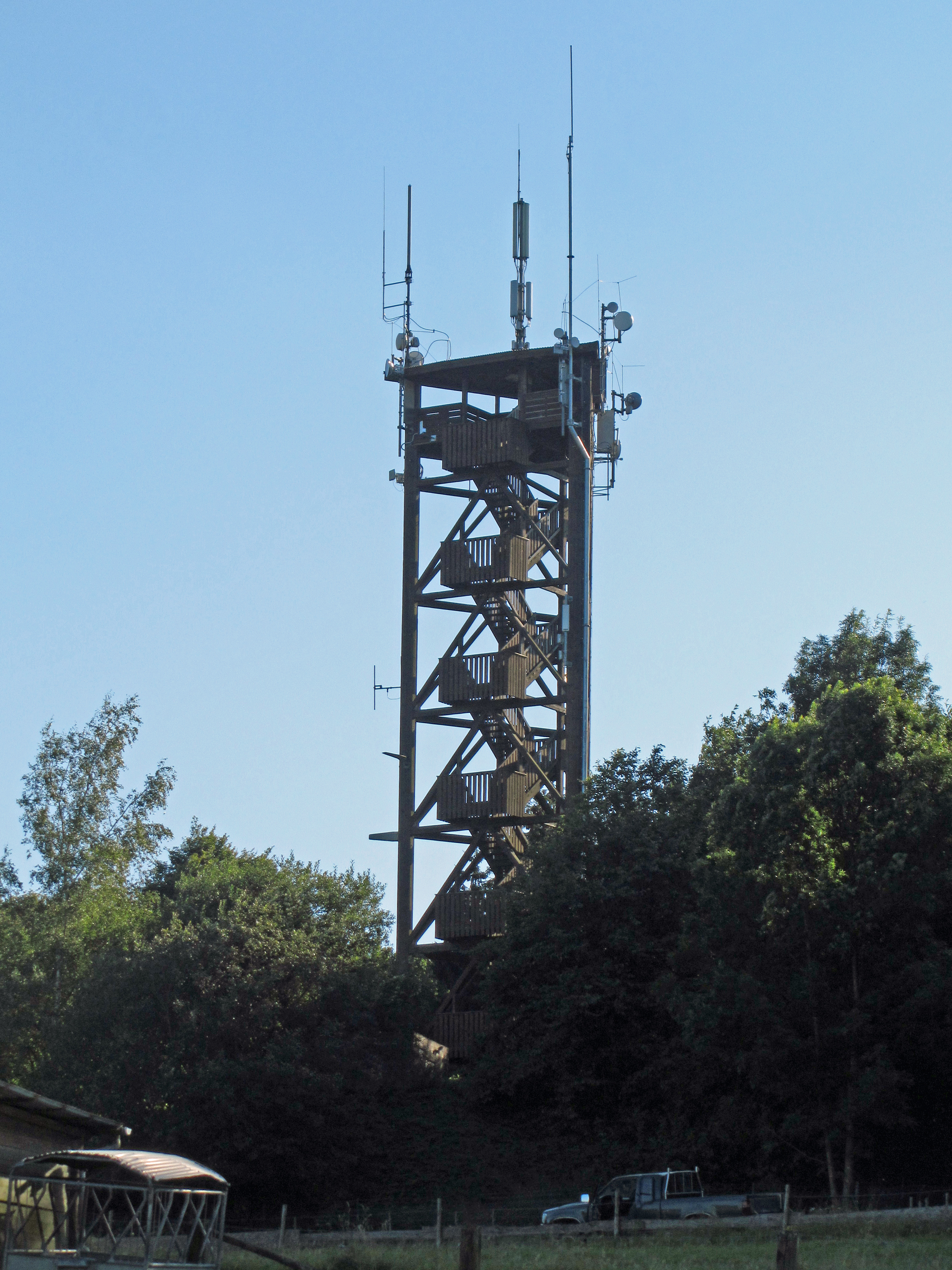 Der Raiffeisenturm auf dem Beulskopf nördlich von Altenkirchen im Westerwald.